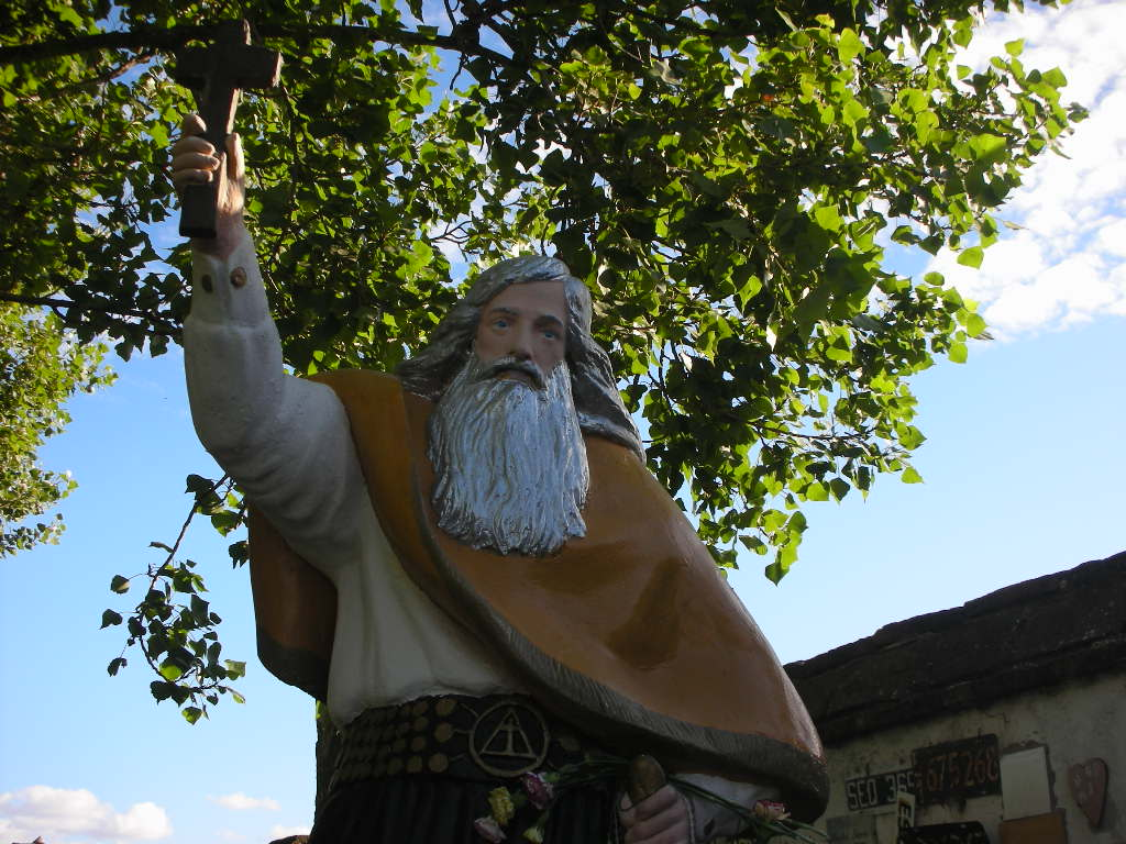 Estatuta de Pancho Sierra en las afueras del Cementerio Local de Salto